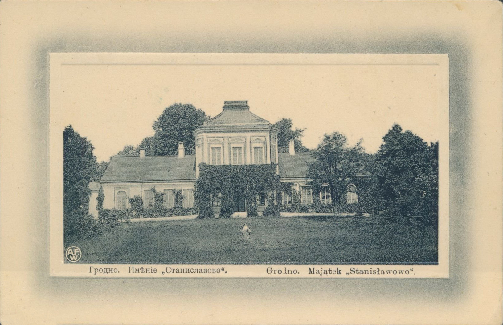 Беларуская (тарашкевіца): Горадня (Horadnia), Станіславова (Stanisłavova). Сядзіба